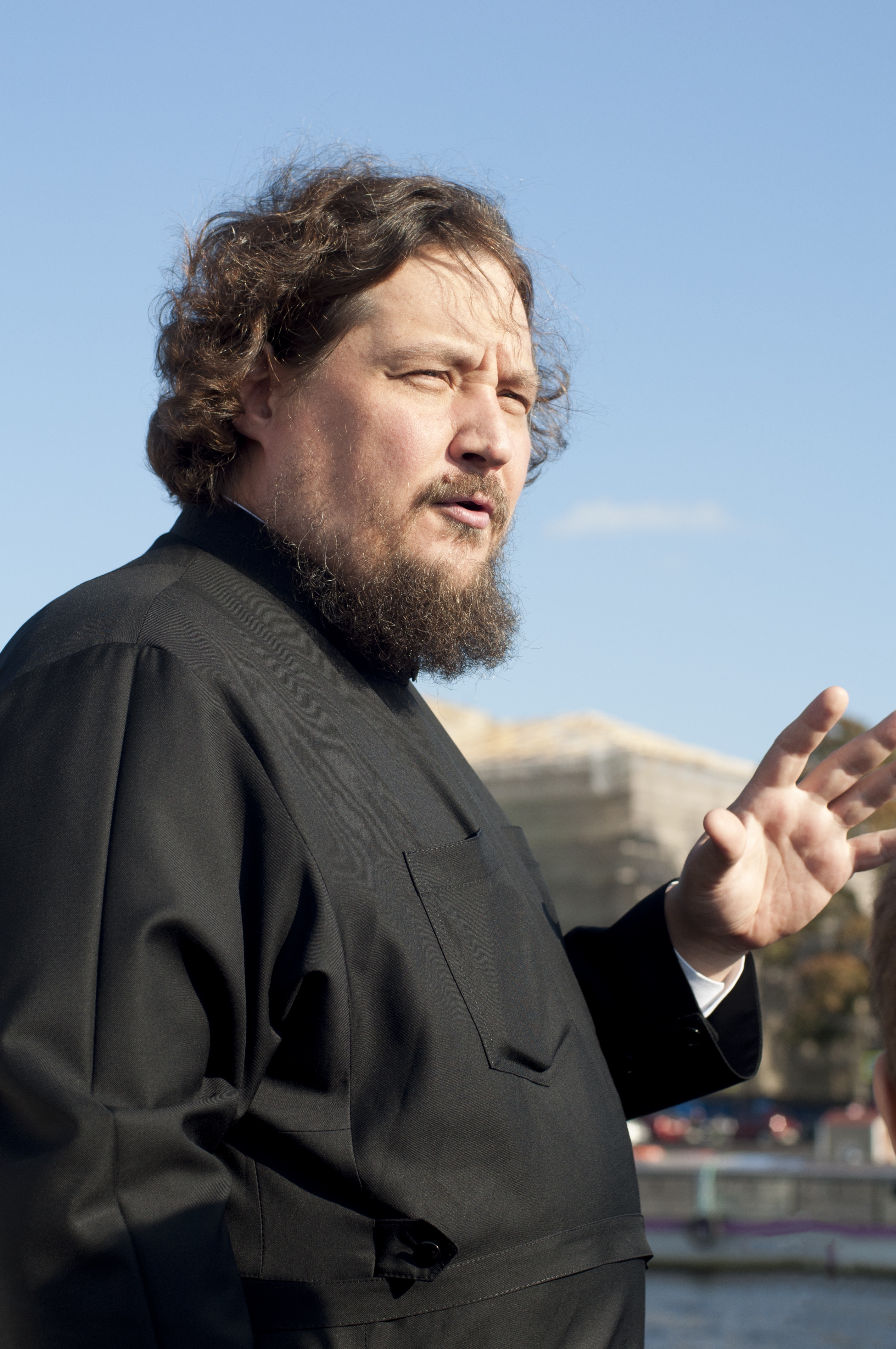 13 сентября 2013, Экскурсия по рекам и каналам Санкт-Петербурга 1 курса бакалавриата с ректором